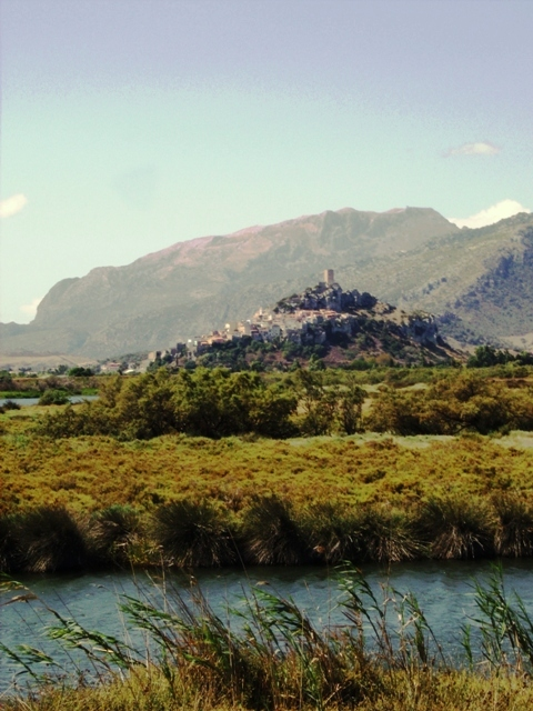 Sardegna - Il paese di Posada e sullo sfondo il Monte Albo - Own work --Shardan 16:55, 14 September 2007 (UTC)